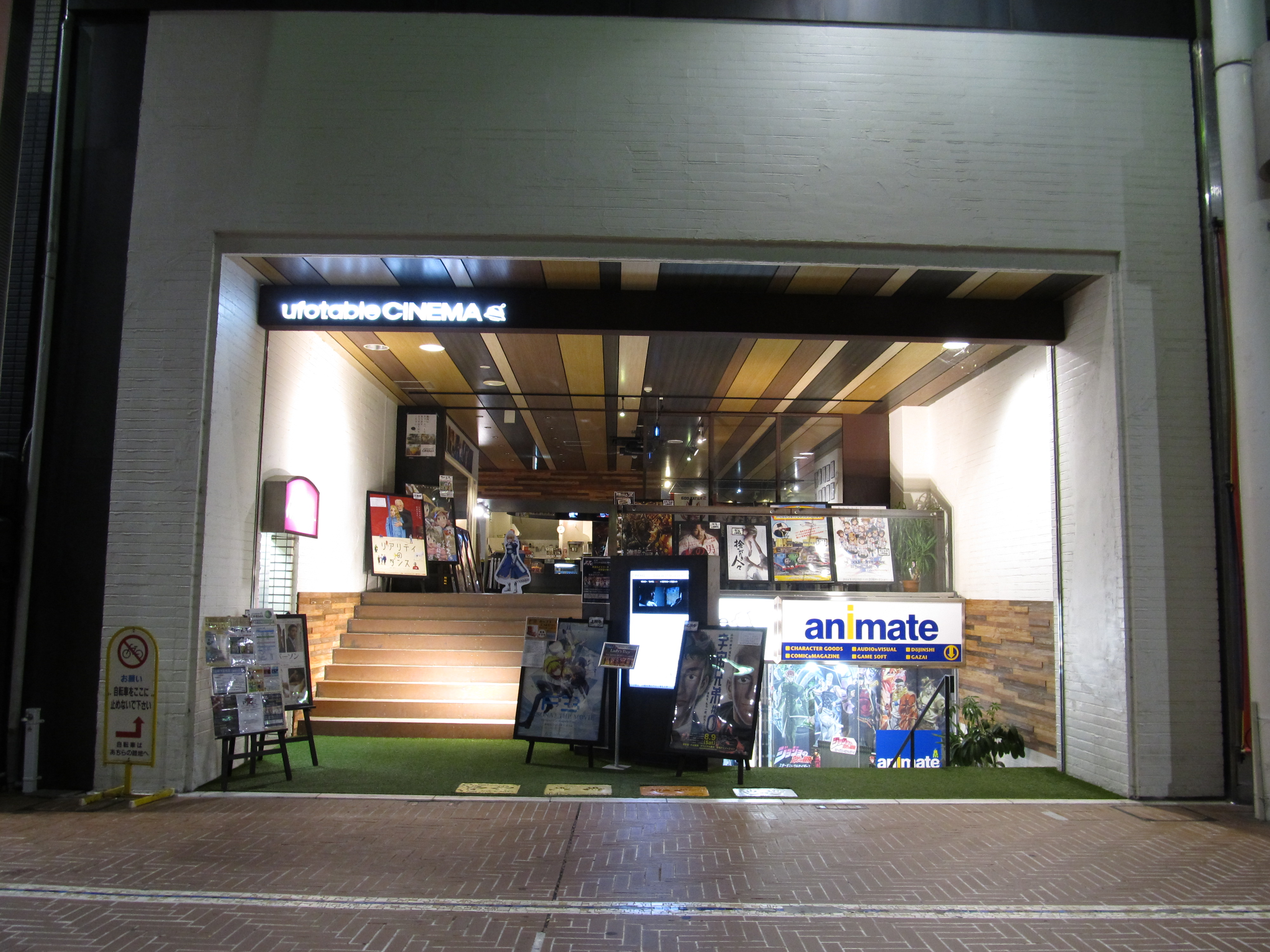 徳島県徳島市東新町にある映画館ufotable CINEMA。 地下1階にはアニメイト徳島店がある。